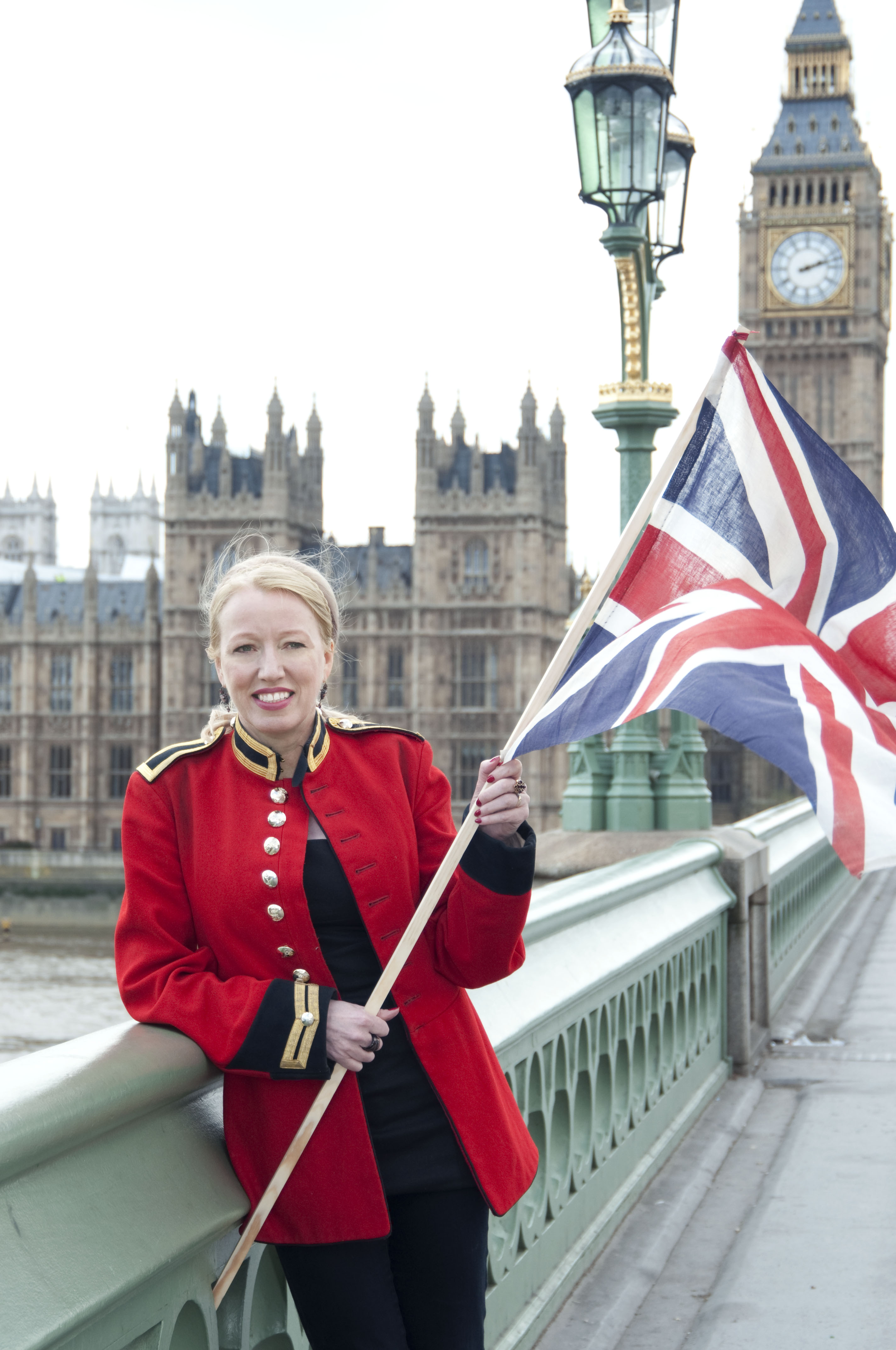 Jan Constantine and the Union Jack in London, 2008